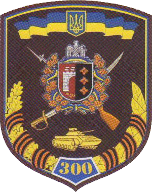 Нарукавний знак, 300 окремий механізований полк